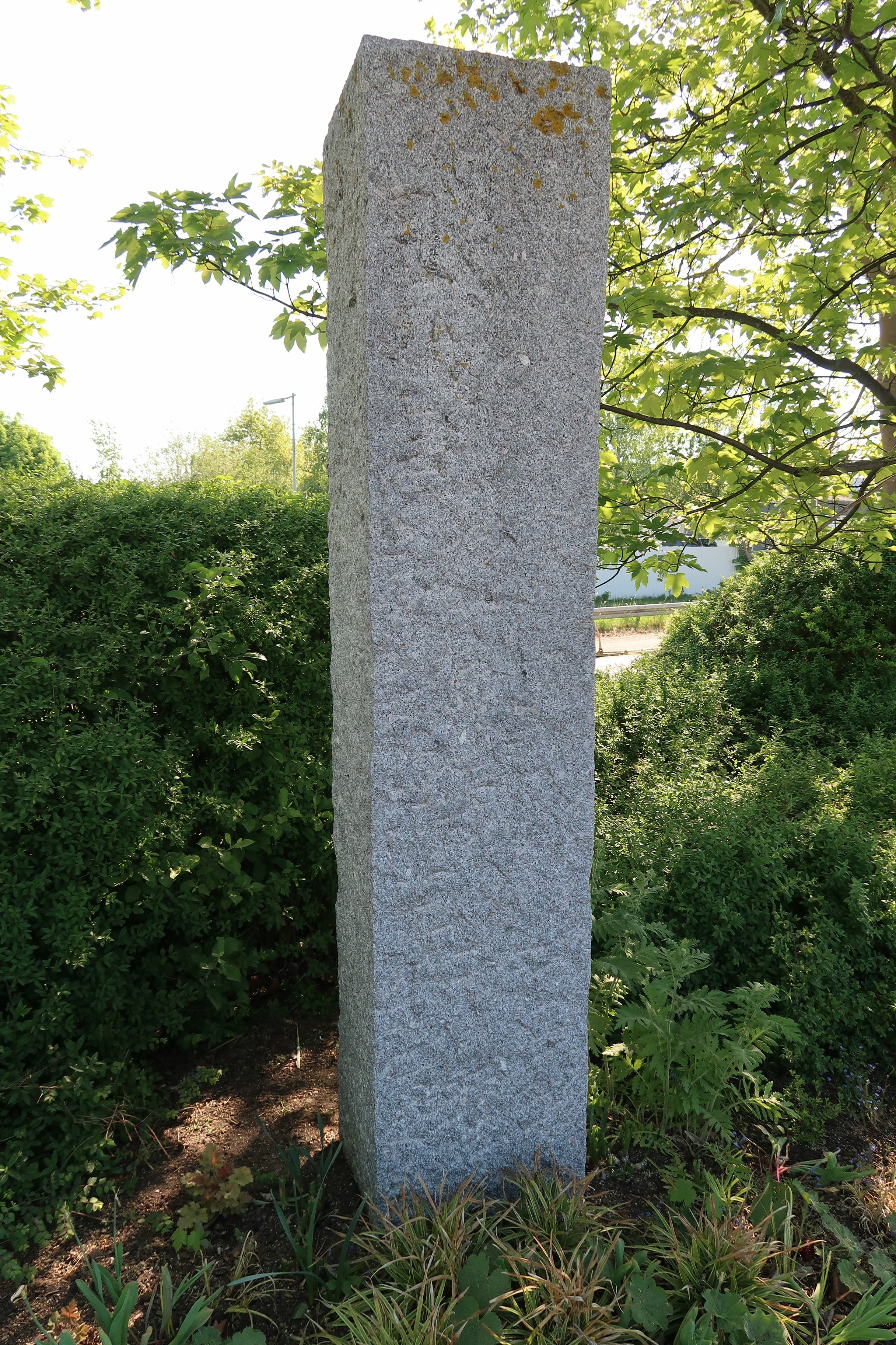 Deutschland (D) - Baden-Württemberg (BW) - Landkreis Sigmaringen (SIG) - Bad Saulgau: Denkmal zur Erinnerung an das 'KZ-Außenlager Saulgau' [Claas-Parkplatz, an der Ecke Josef-Bautz-Straße/Altshauser Straße]